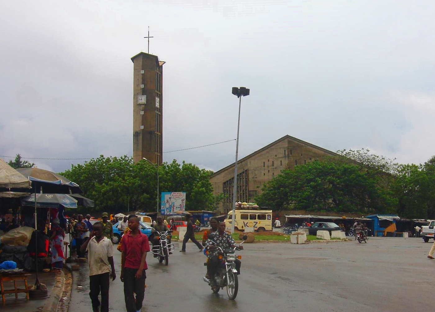 Cathédrale de Bouaké (Côte d'Ivoire)